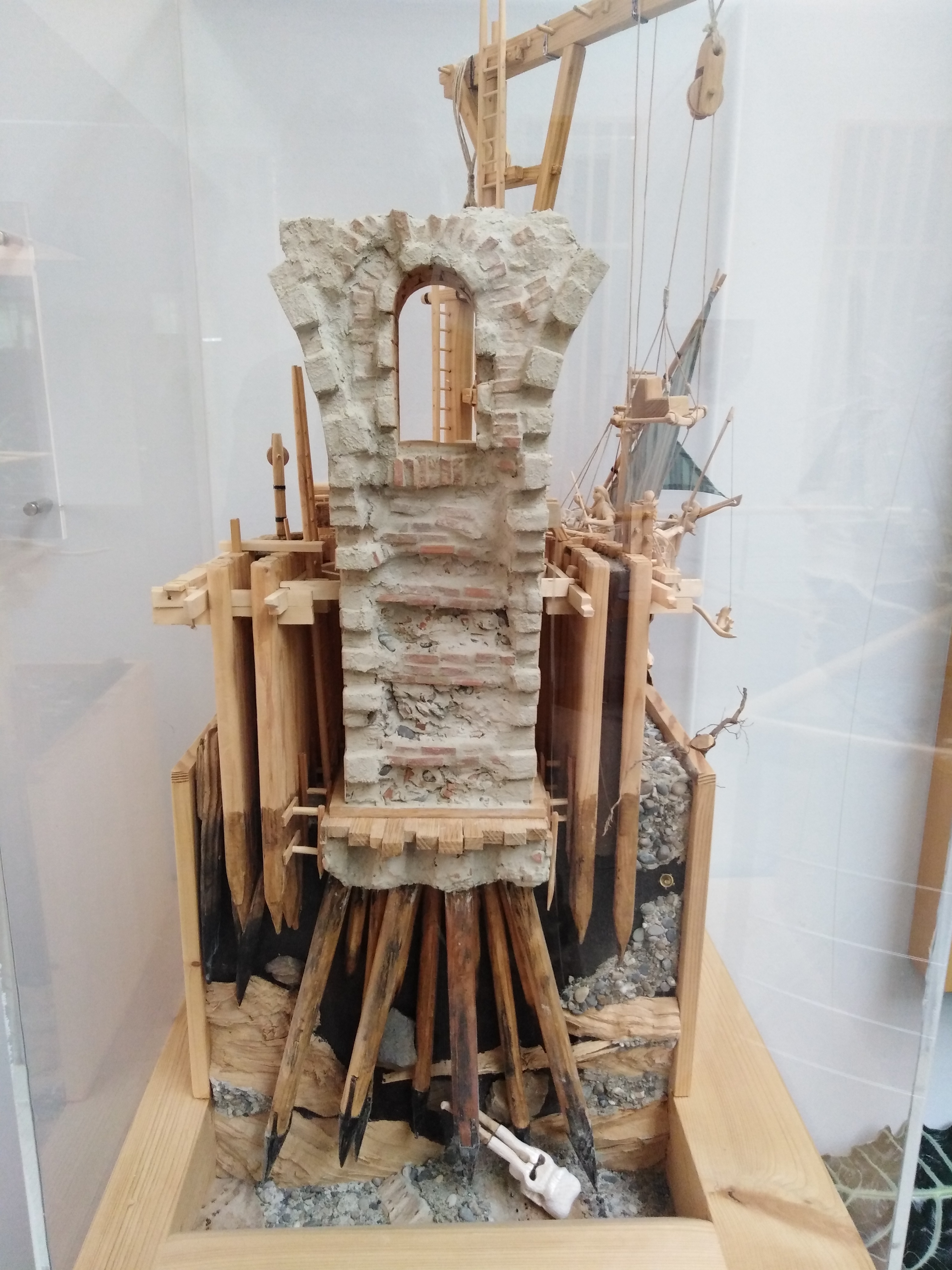 KB Römerbrücke Rheinheim-Zurzach (CH) über den Hochrhein, Pfeilermodell von Wolf Pabst im Rathaus von Küssaberg im Landkreis Waldshut in Baden-Württemberg. Zuordnung 1. Jahrhundert n. Chr.